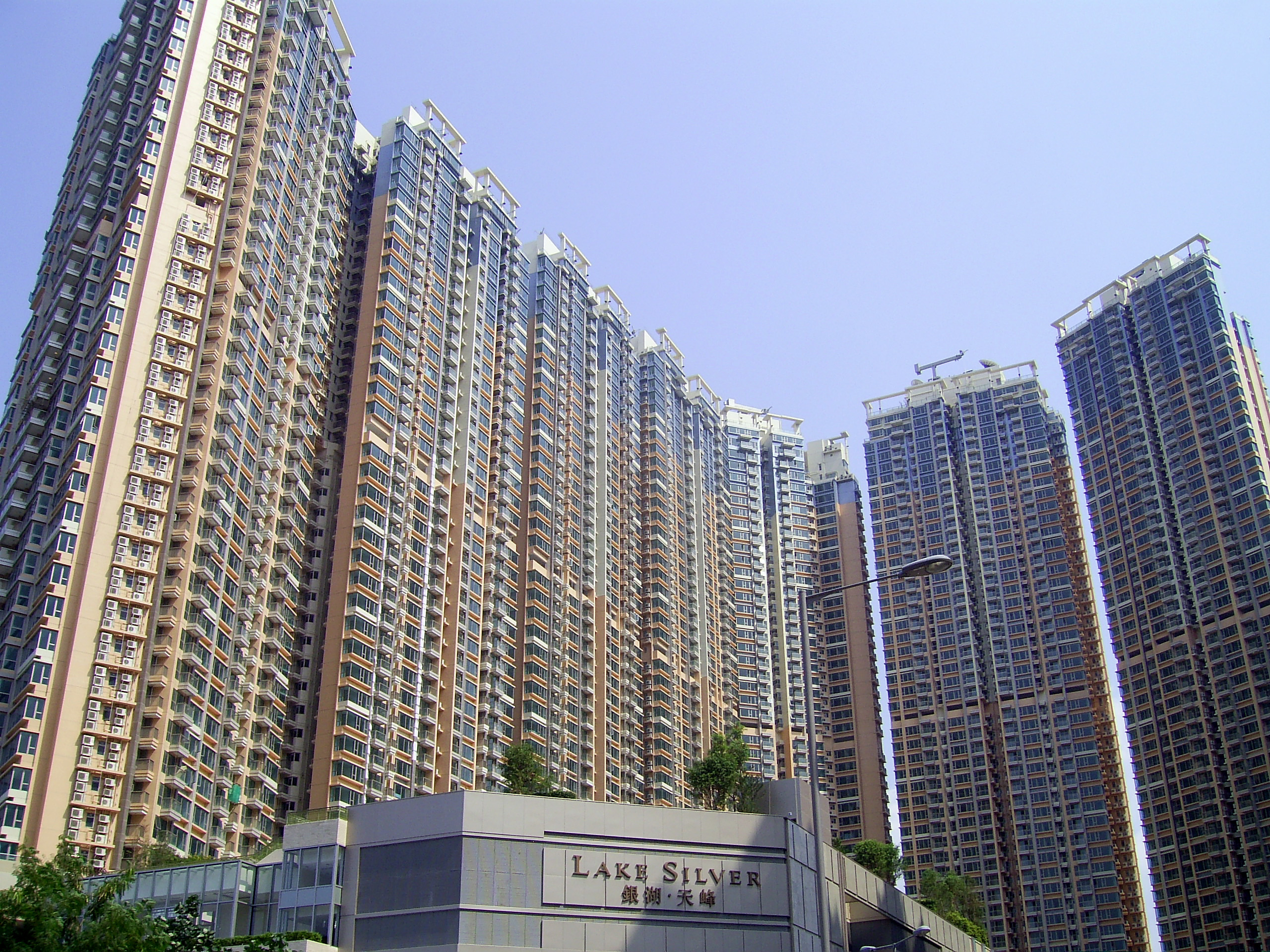 中文（香港）: 銀湖·天峰